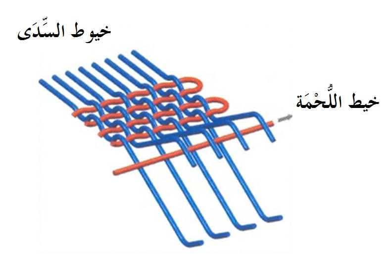 Exemplo de inserção de trama na formação de tecido. Imagem feita por mim.